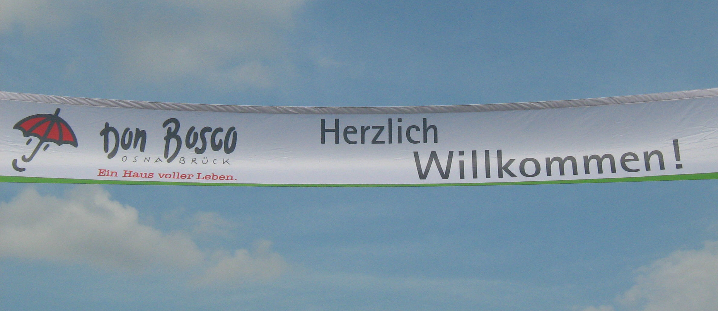 das Fahnentransparent Don Bosco Osnabrück